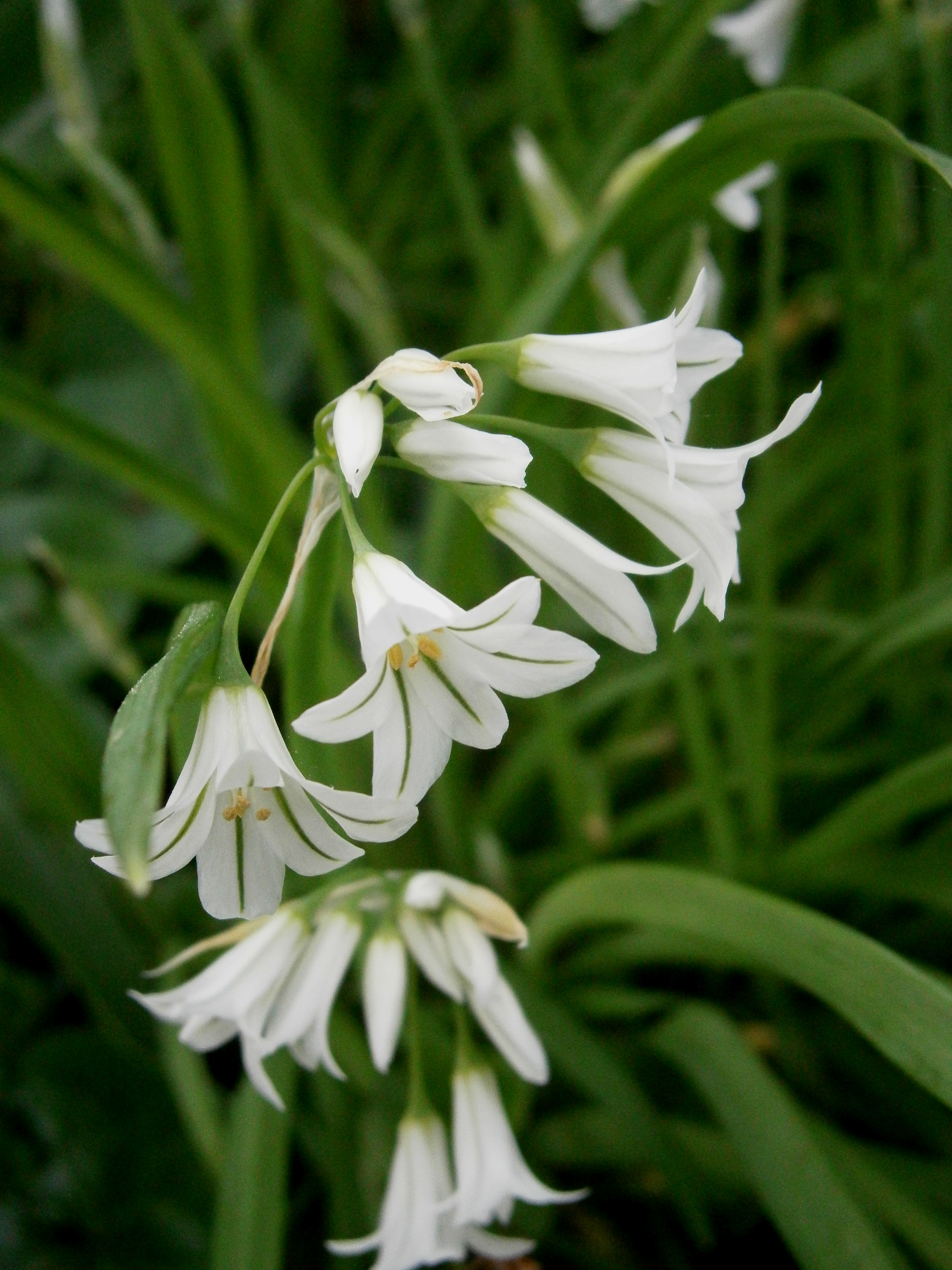 Allium triquetrum close-up